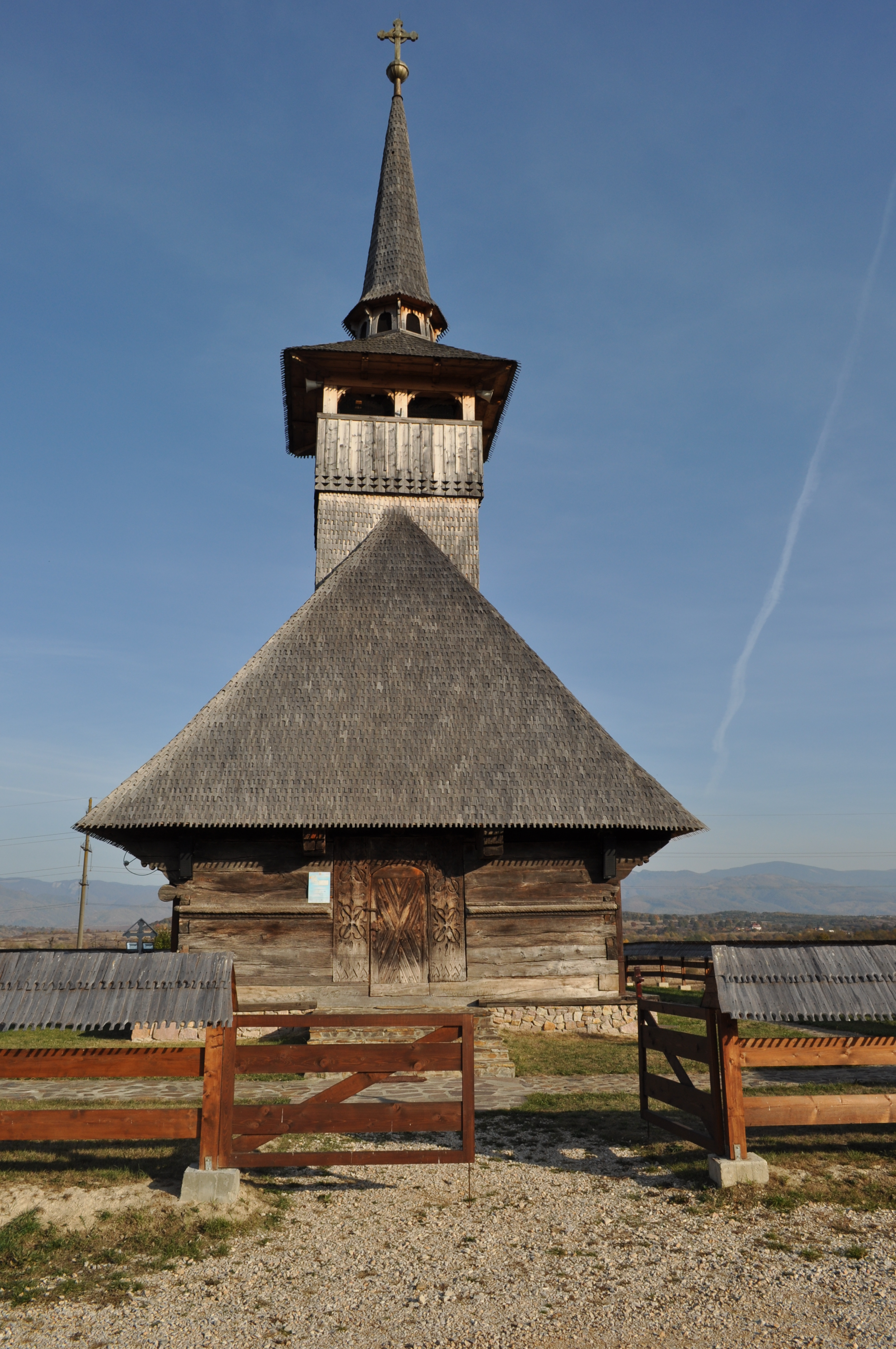 Biserica de lemn „Sf. Trei Ierarhi" din Ghighișeni mutată la Cucuceni